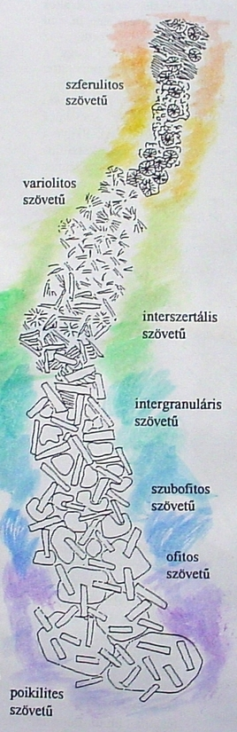 Holdi lávafolyás kőzetszöveteinek rétegződése